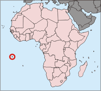 Landkarte Afrikas, Ascension hervorgehoben, selbst erstellt